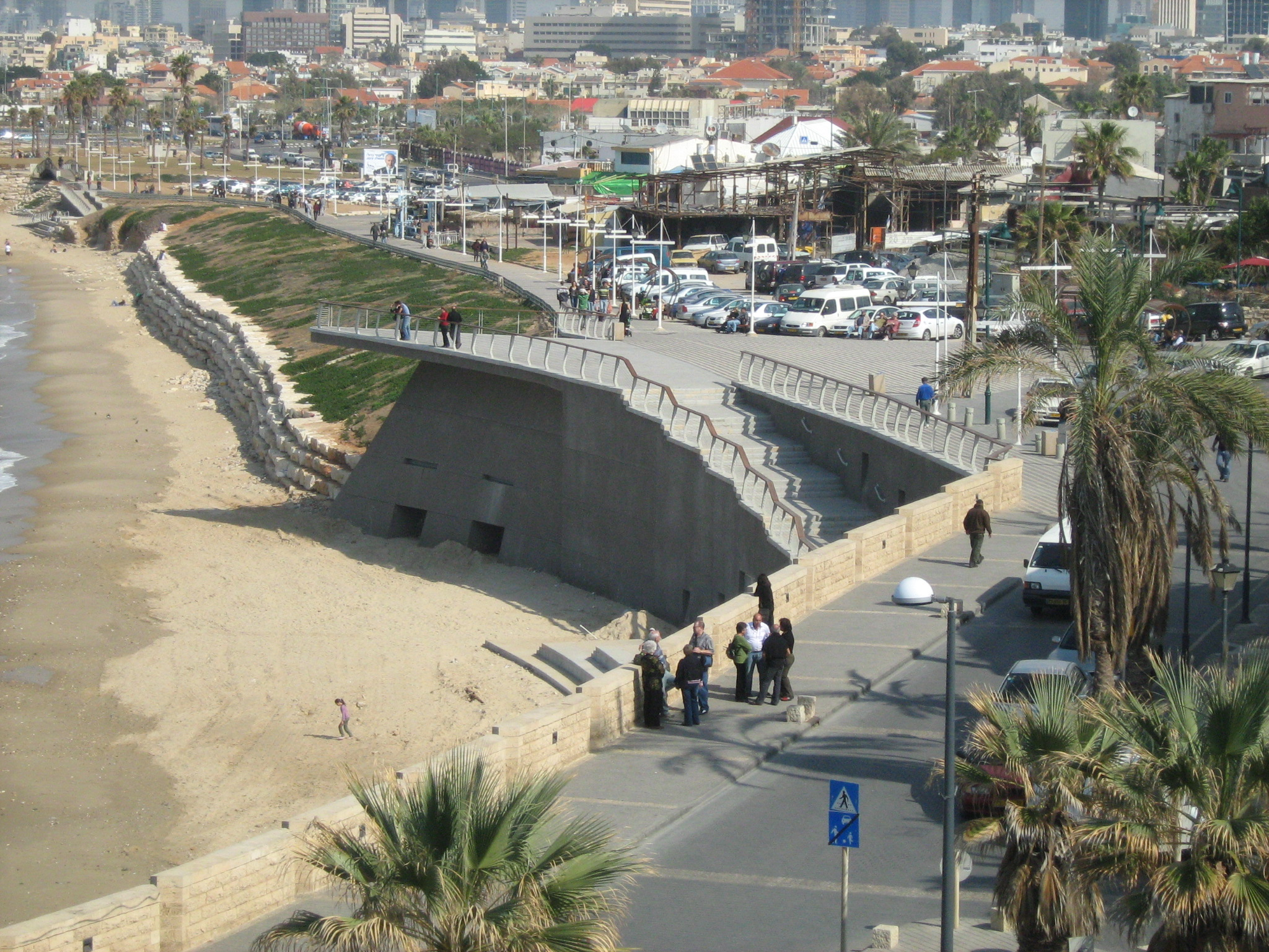 הקצה הצפון מערבי של הטיילת הקלה